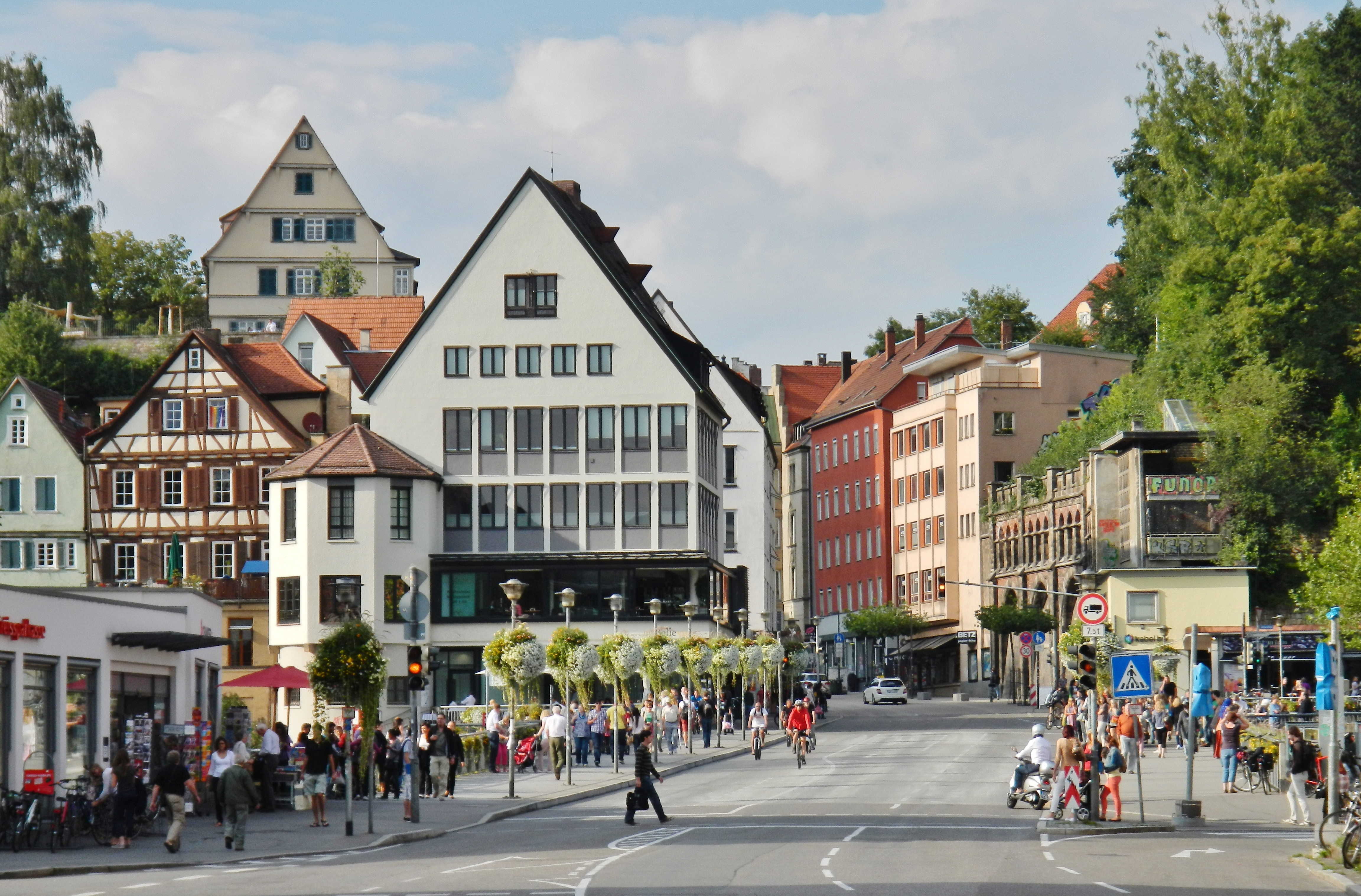 Beim 366 km langen Neckartalradweg: Tübingen Neckarbrücke